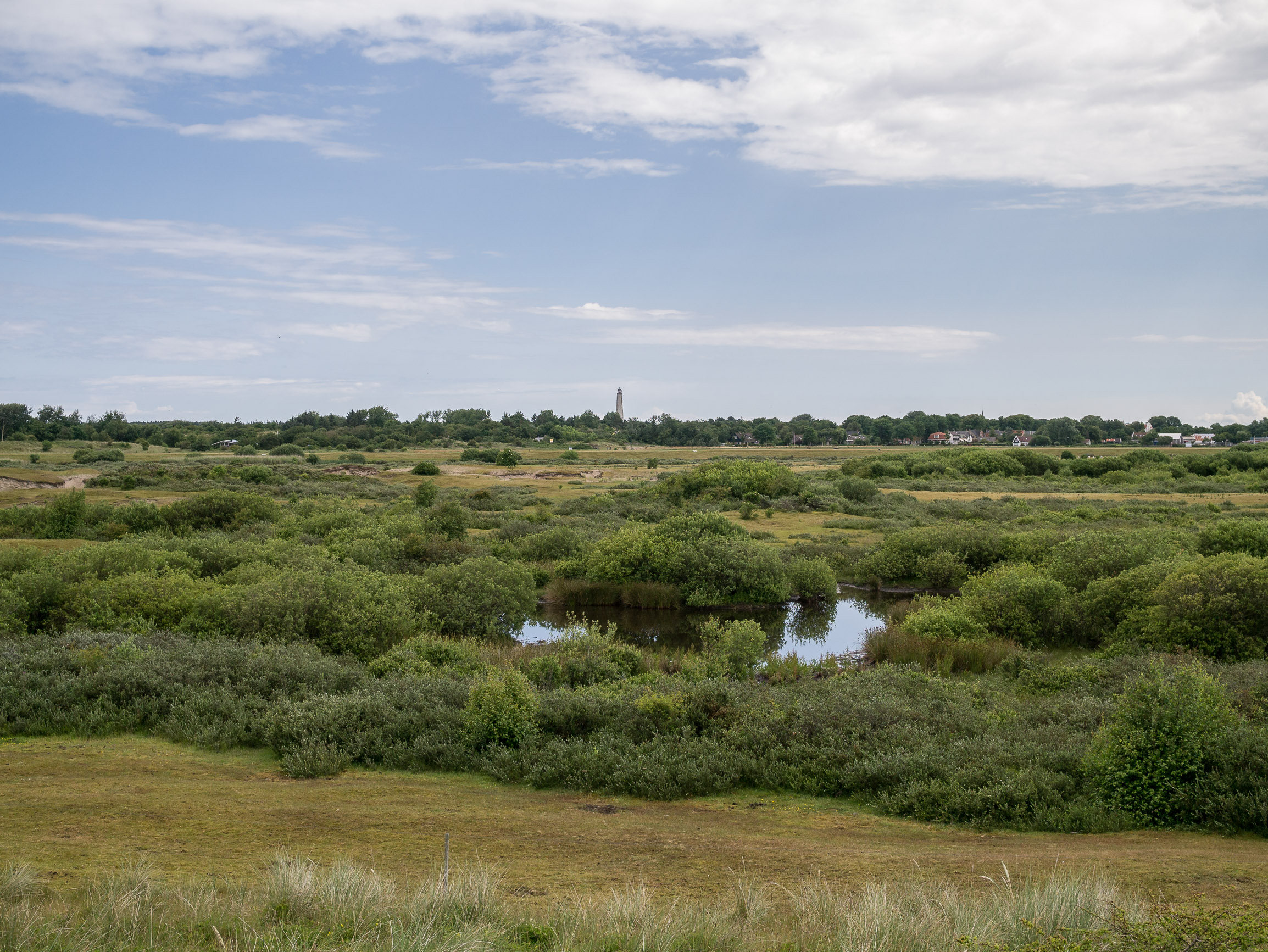 Vennetje met op de achtergrond het dorp Schiermonnikoog This is a photo or sound file made in Schiermonnikoog National Park in the Netherlands, with the main subject of the file in the category: humans in nature